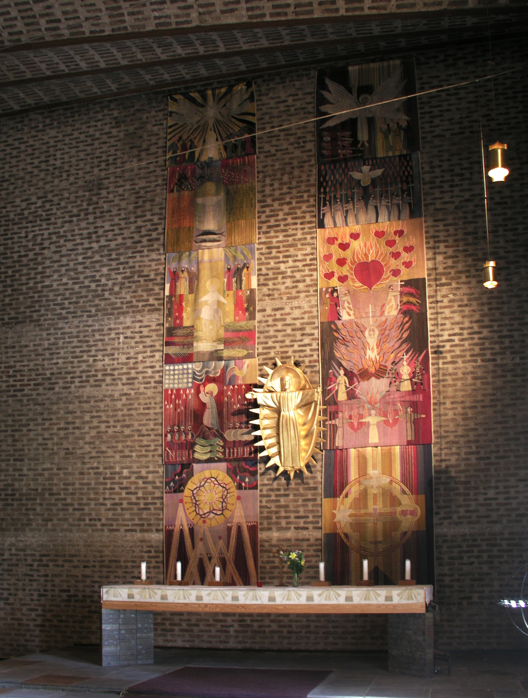 Markuskyrkan, Diocese of Stockholm, Sweden